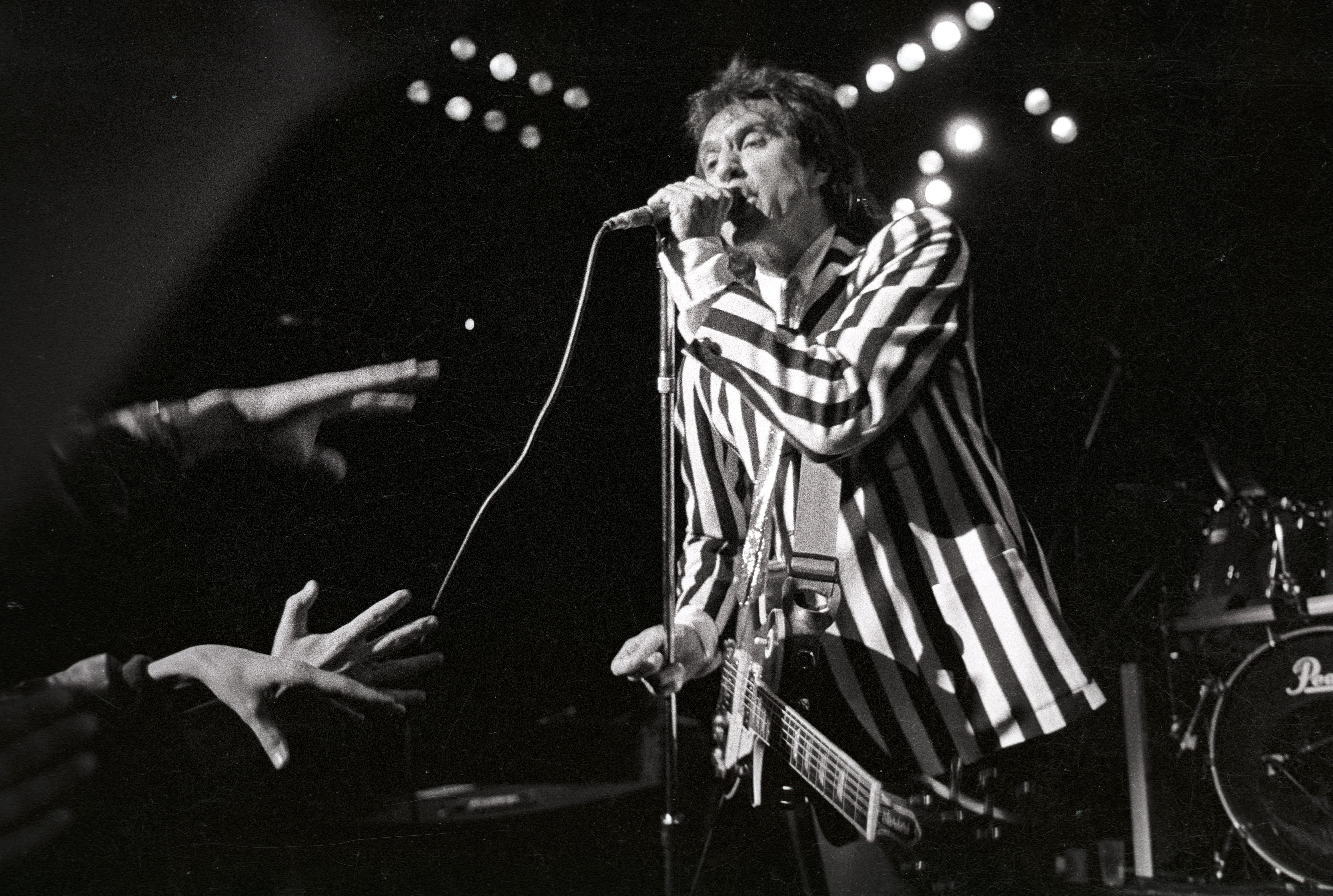 Ray Davies, Koninklijk Circus - Brussels - 1985